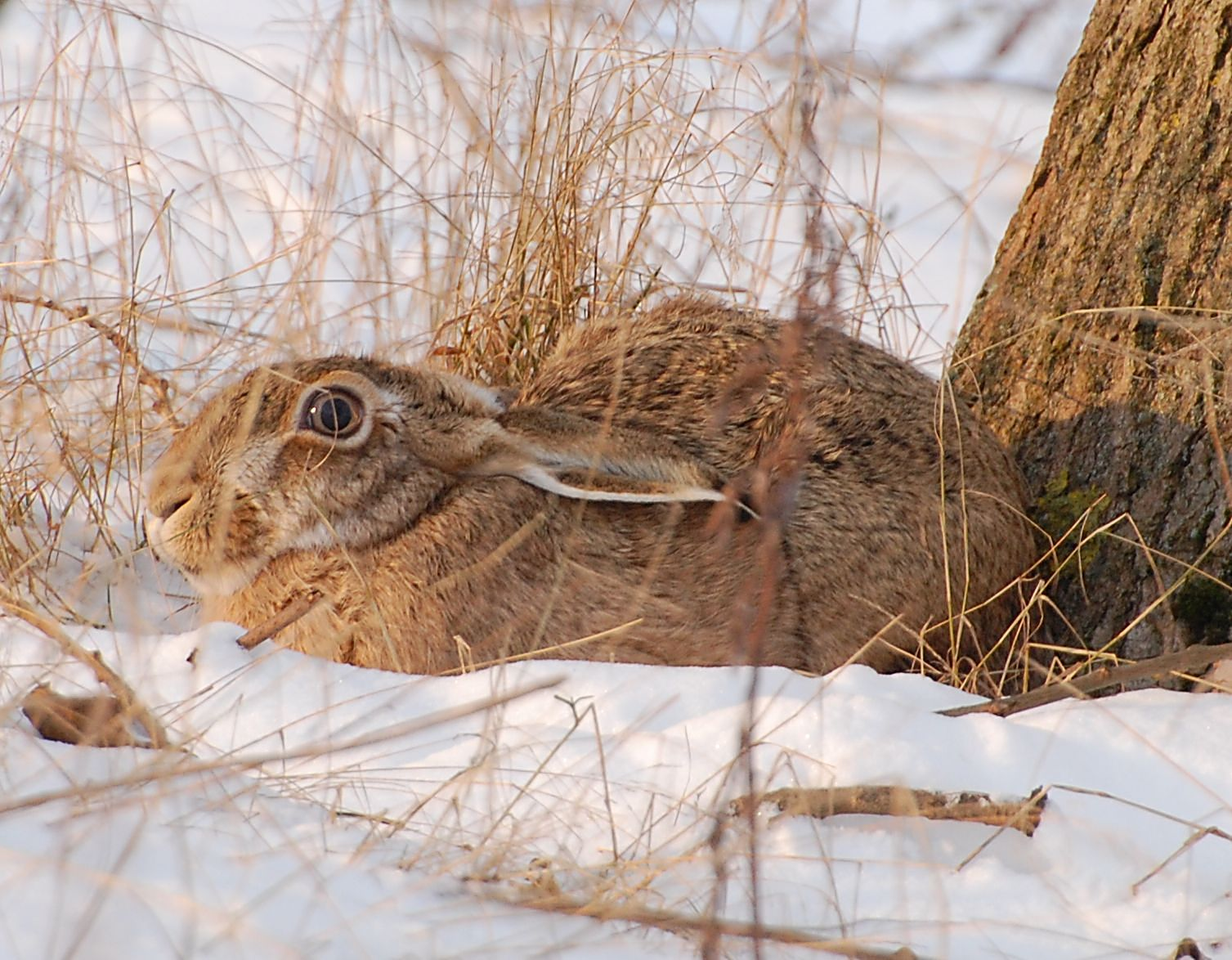 Feldhase (Lepus europaeus), sich in der Mulde drückend. Kreis Prignitz, Land Brandenburg, Deutschland